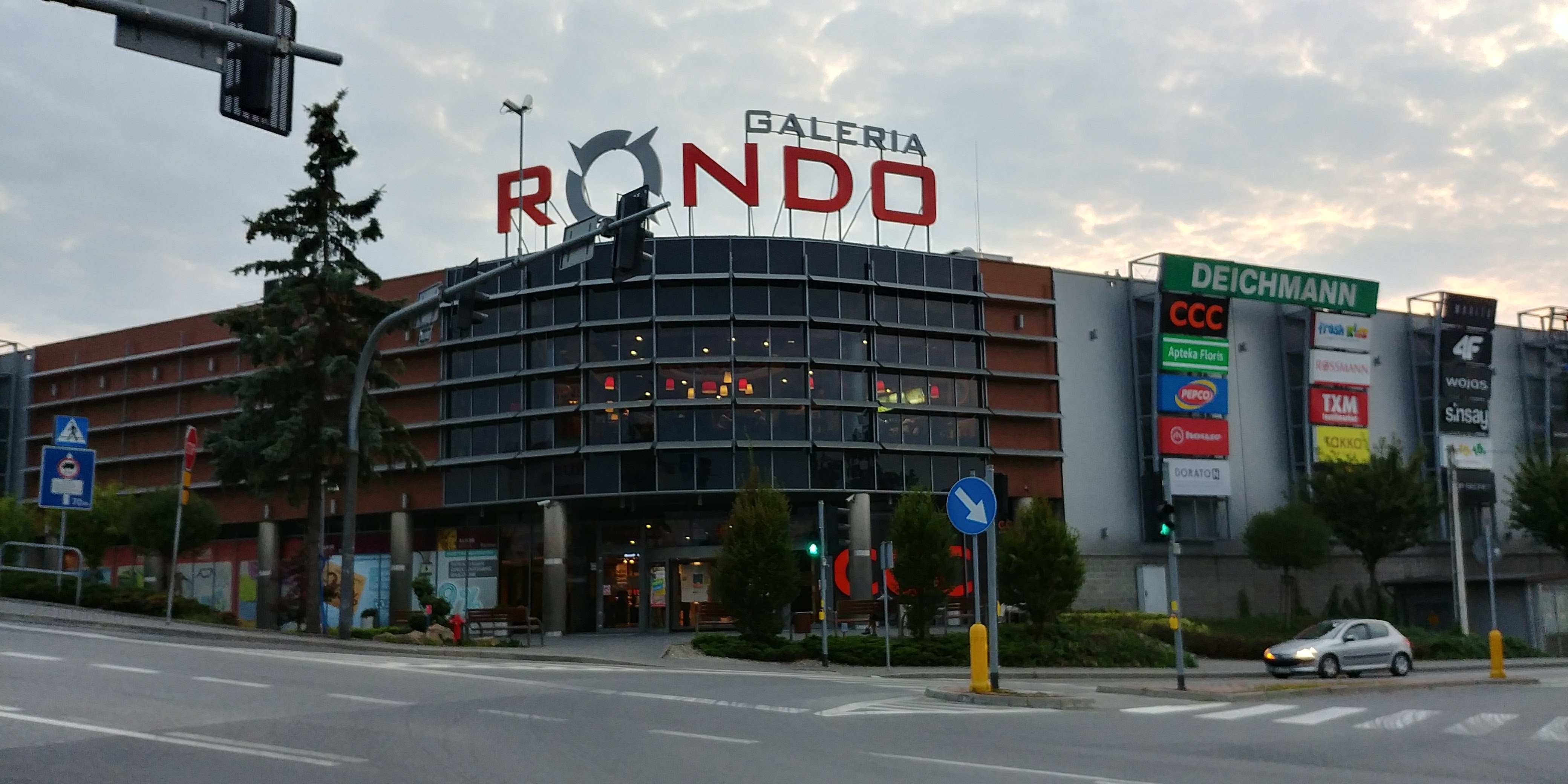 Galeria Rondo w Bochni.jpg